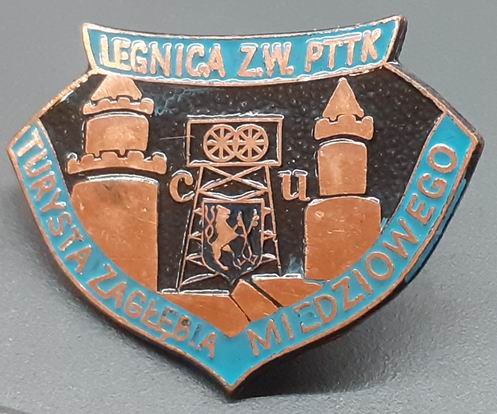 Odznaka PTTK "Turysta Zagłębia Miedziowego" w stopniu brązowym (z niebieską emalią).